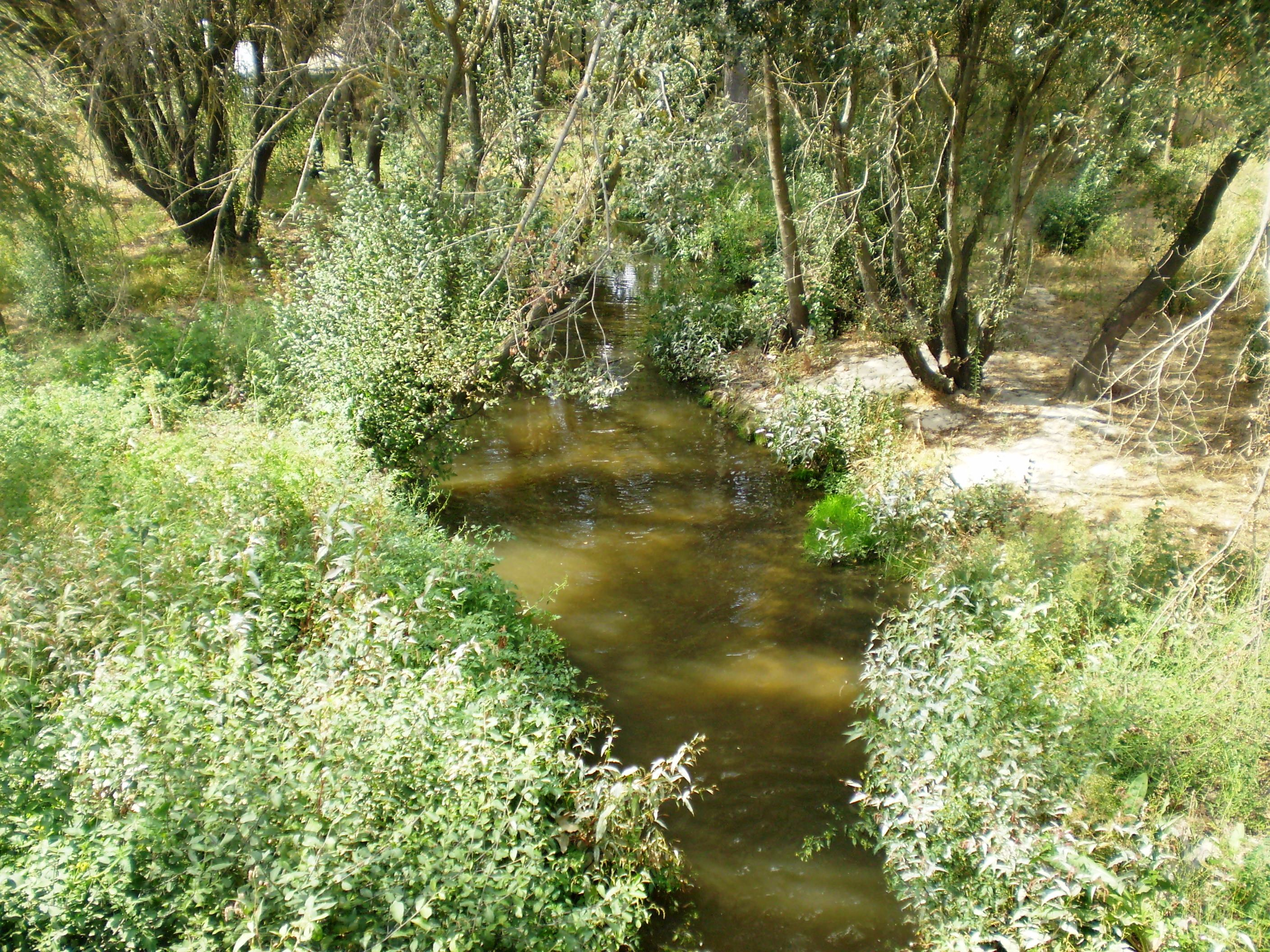 Arroyo del Bodonal o de Viñuelas, Soto de Viñuelas. Madrid (Spain)